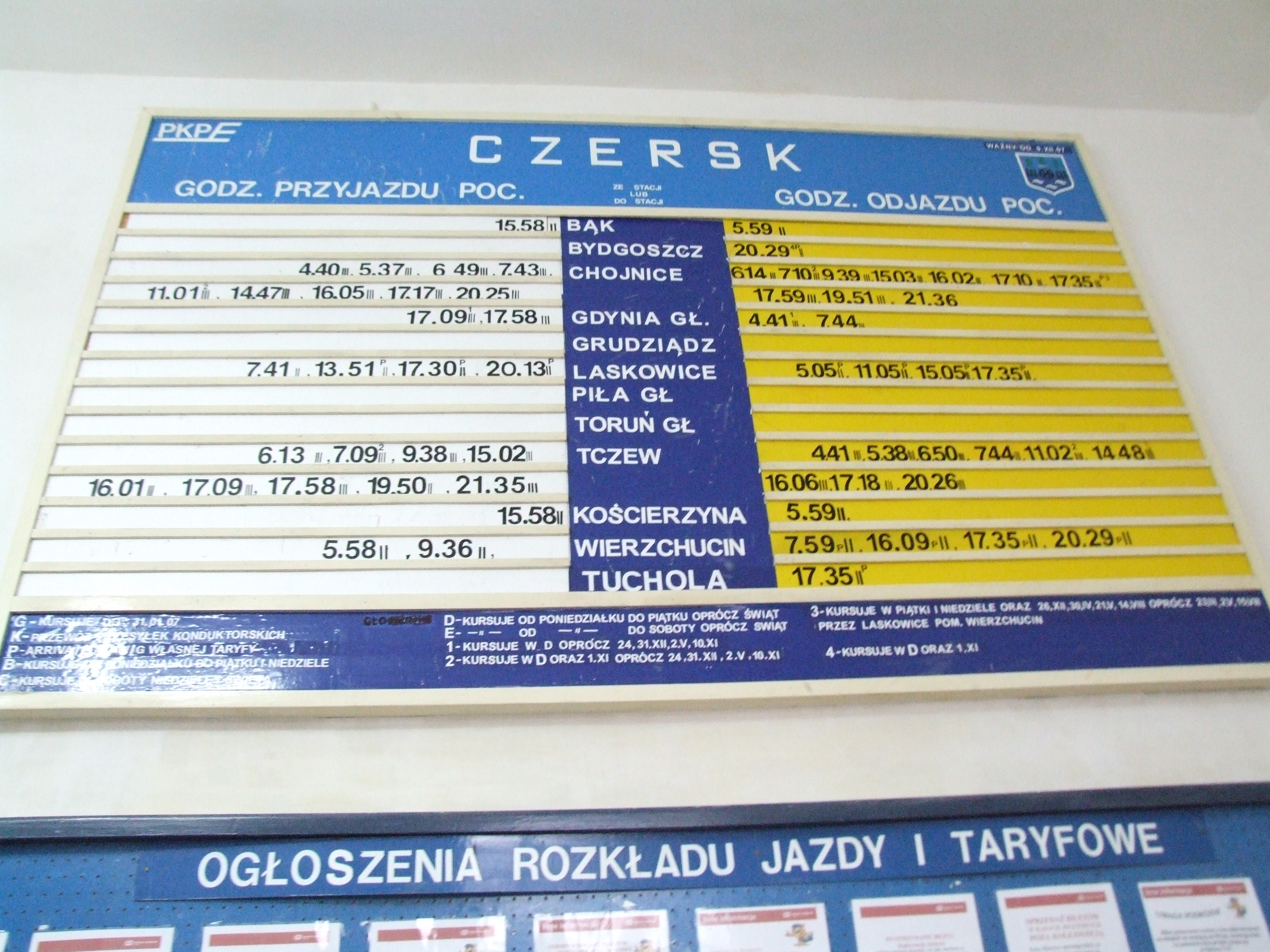 Czersk (dworzec kolejowy)